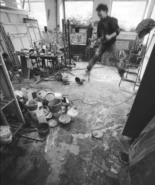 Jörg Ernert in seinem Atelier